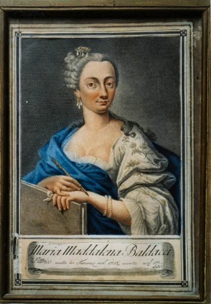 d'après une gravure de Pazzi Pietro Antonio